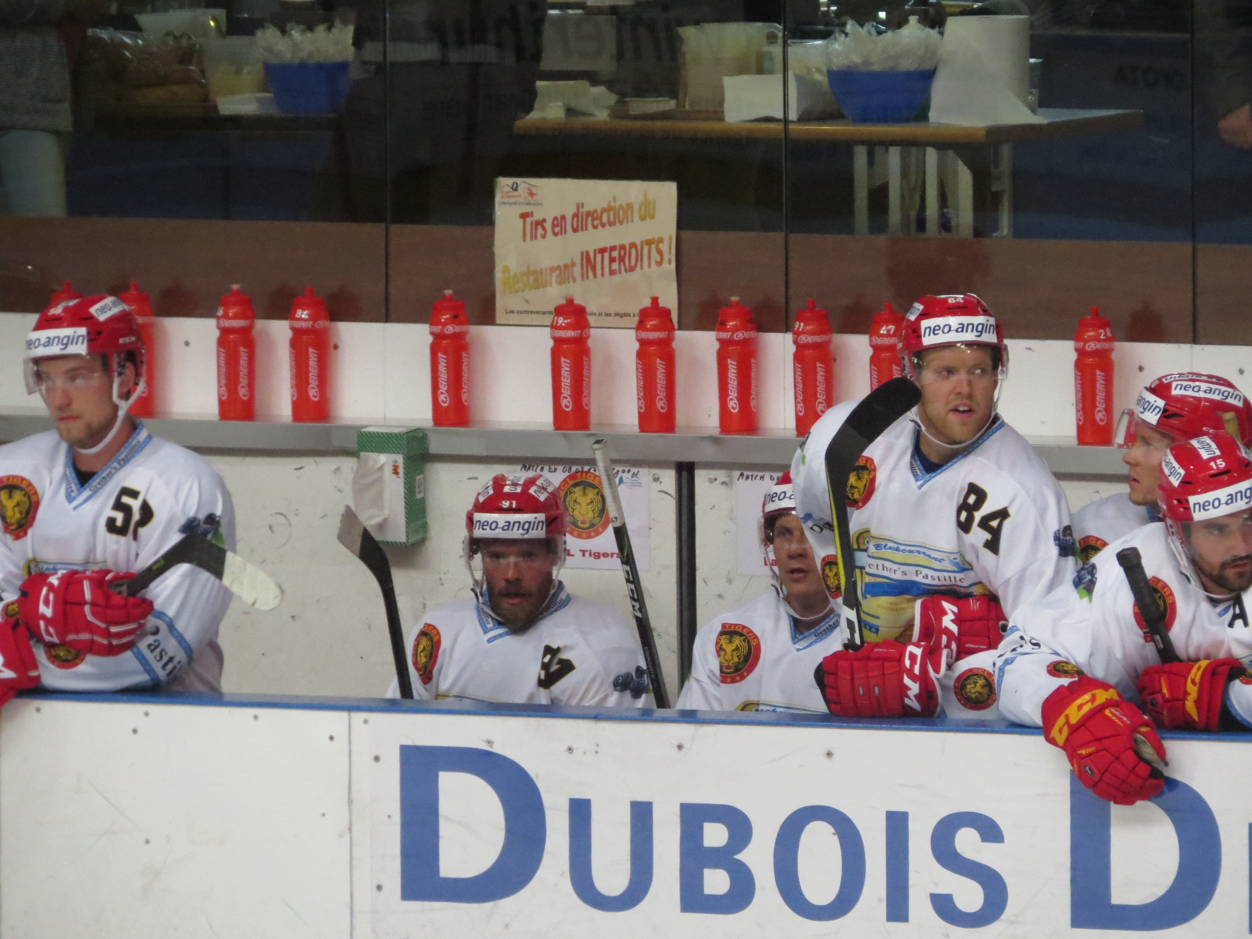 Match entre les Dragons de Rouen et les Tigers de Langnau le 8 août 2017 au Sentier (Hockeyades) 15 Gerber Roland 84 Elo Eero 91 Berger Nils 58 Gustafsson Anton